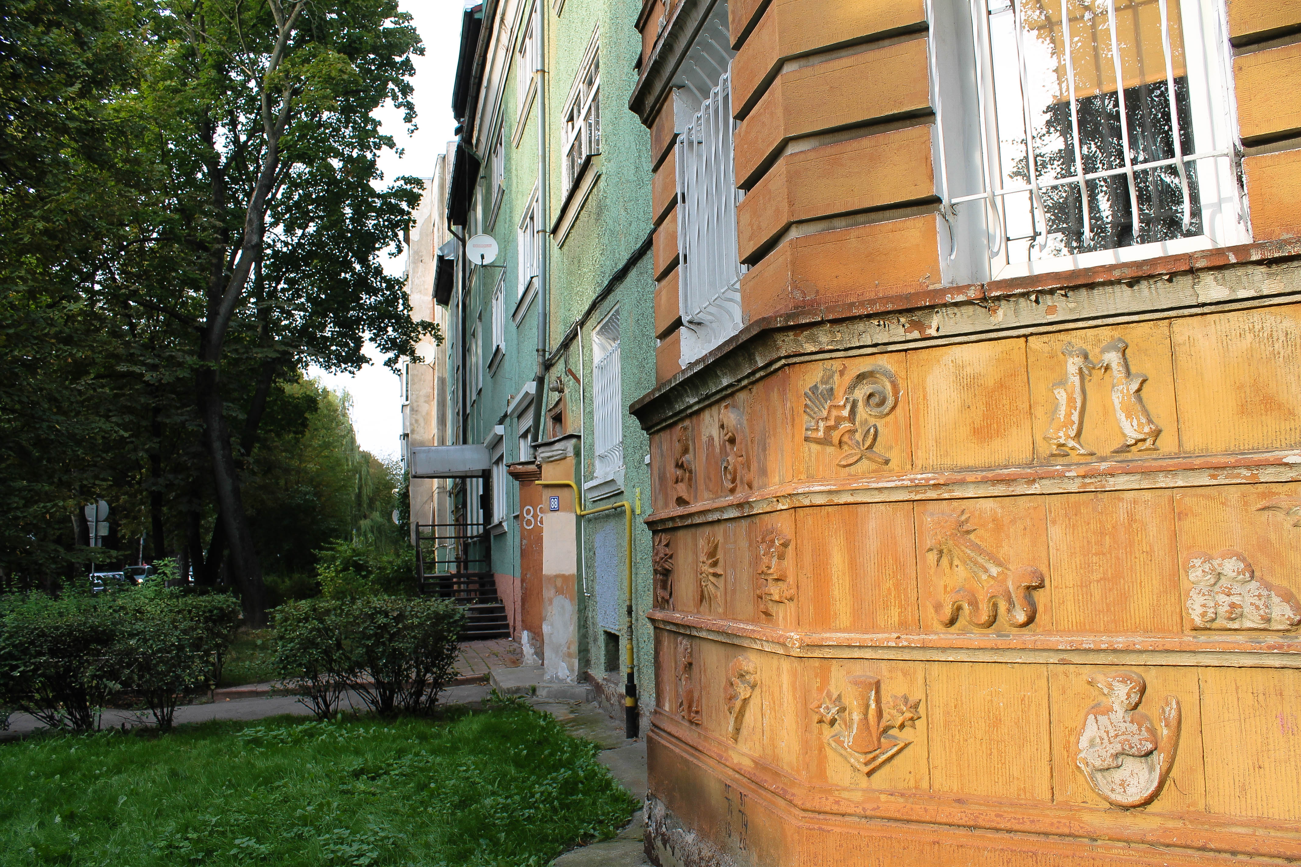 Жилой дом: улица Комсомольская, 84-88, Калининград, Калининградская область